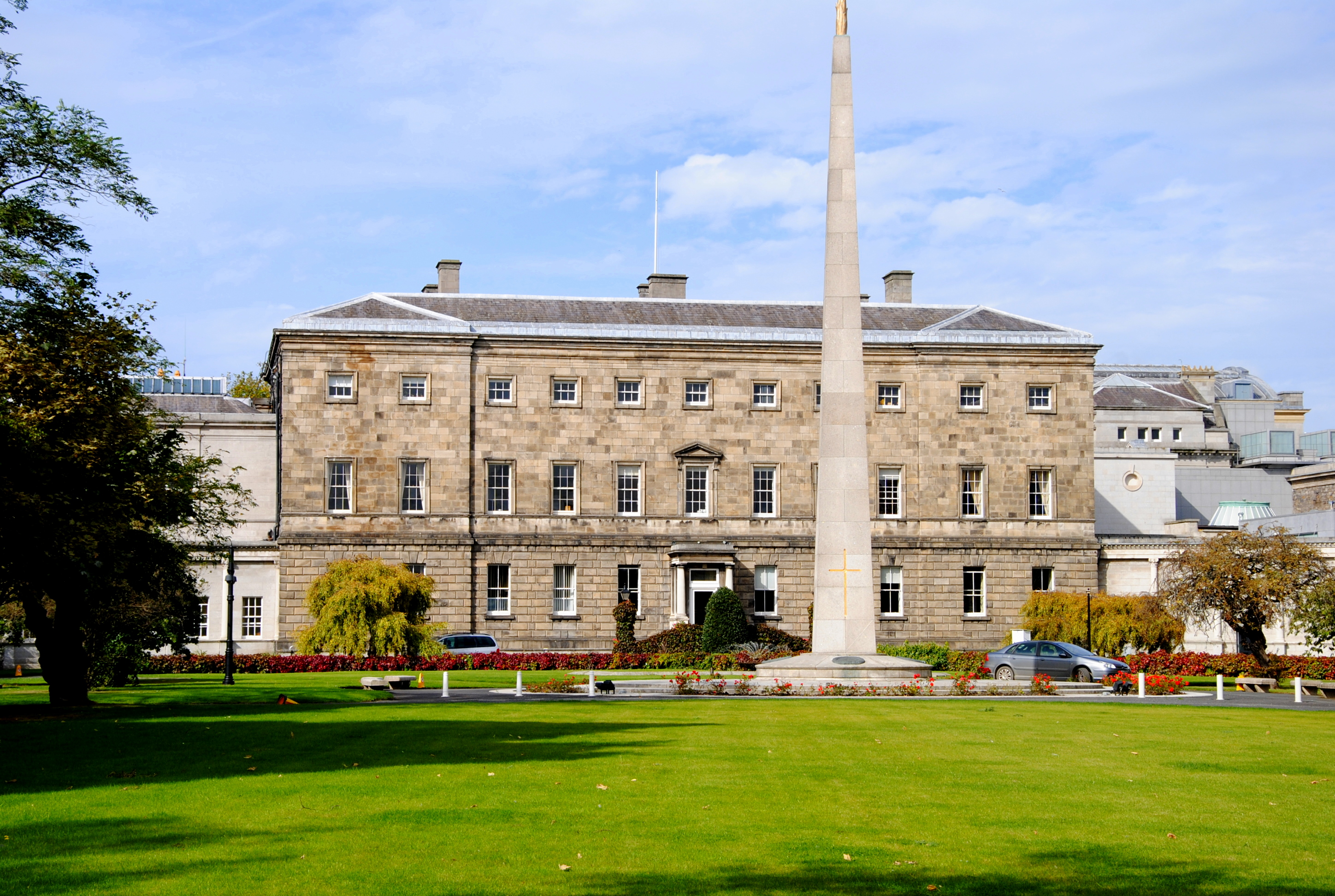 Dublin, Irlanda.